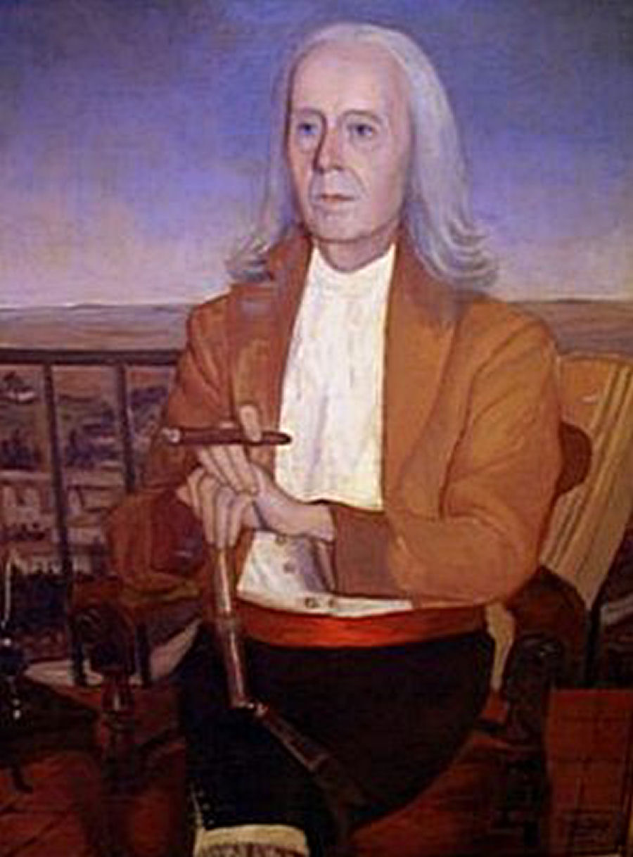 Fotografía de óleo exhibido en el Museo Histórico de Santa Fe, Argentina